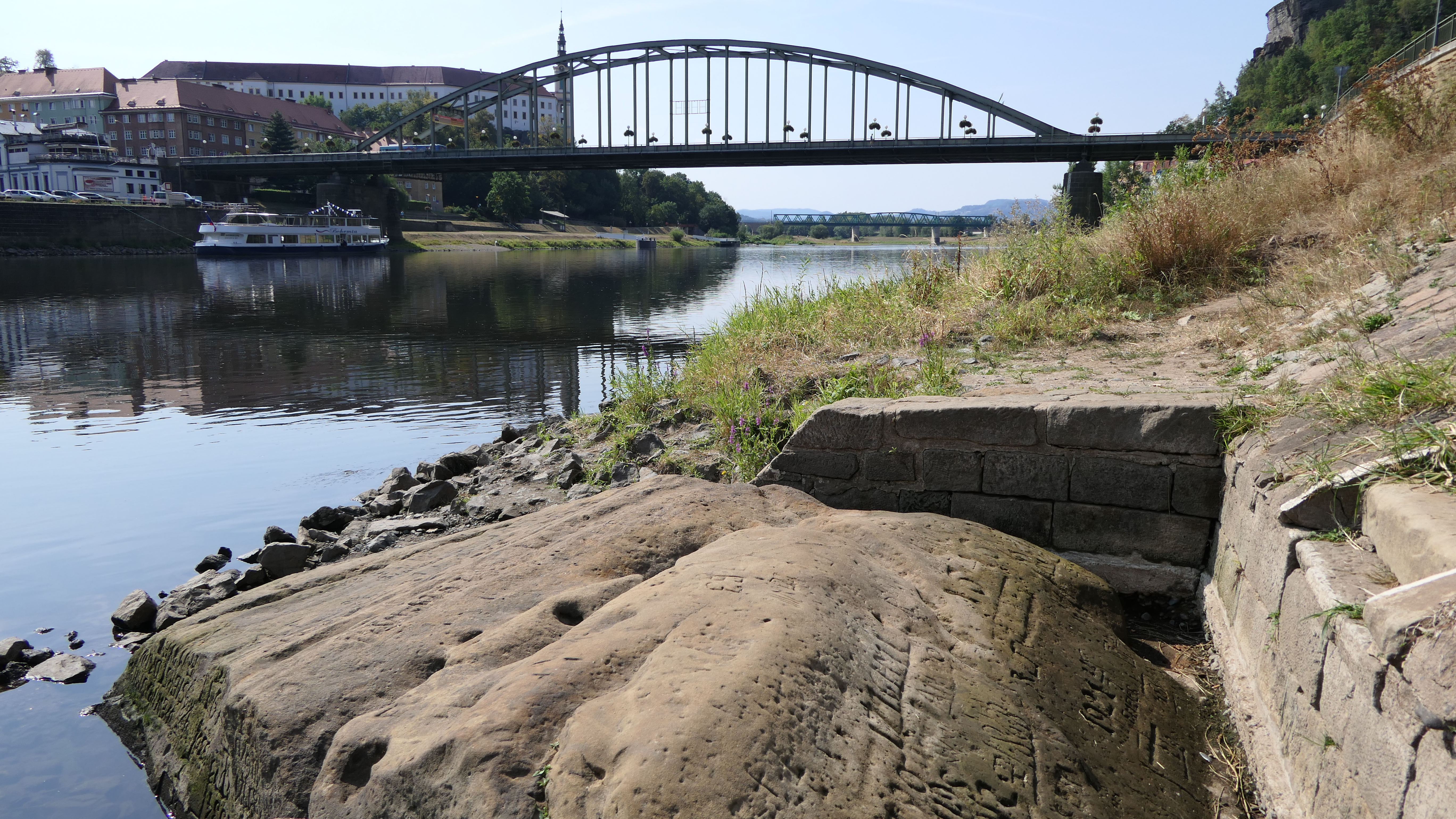 Hungerstein in Decin